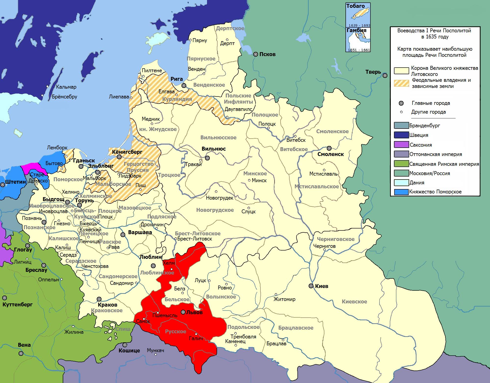 Rzeczpospolita Obojga Narodów w 1635 r.; województwo ruskie Polish-Lithuanian Commonwealth in 1635; Ruś Voivodeship